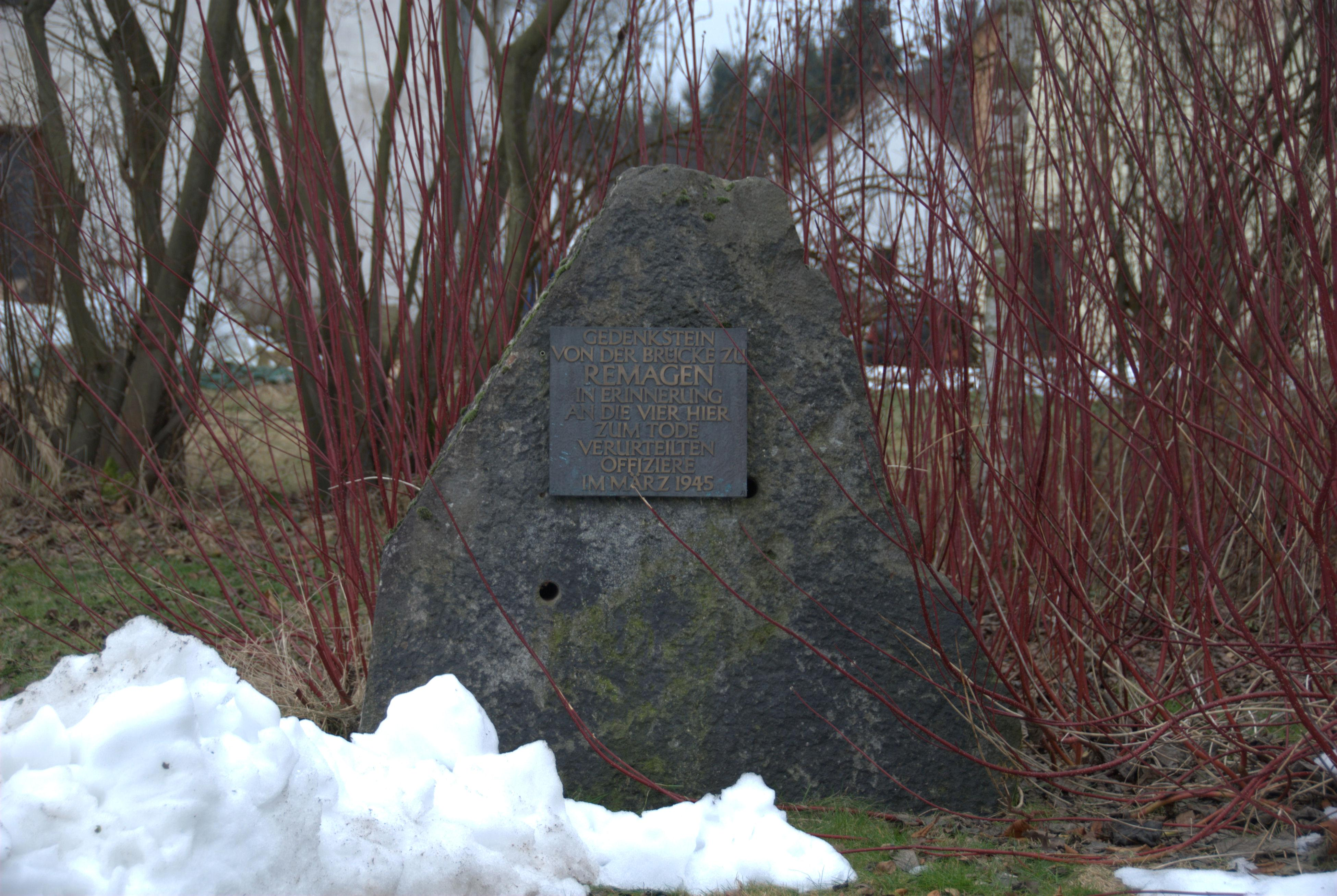 Gedenkstein in Oberirsen im Landkreis Altenkirchen (Westerwald)